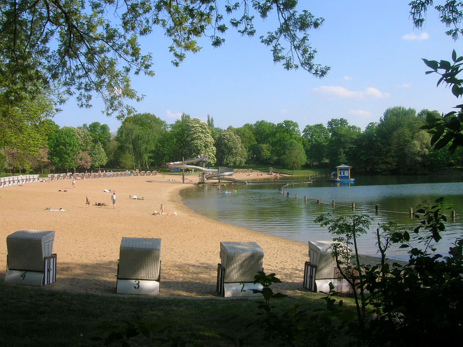 Orankesee in Berlin-Hohenschönhausen, open air bath (Strandbad)